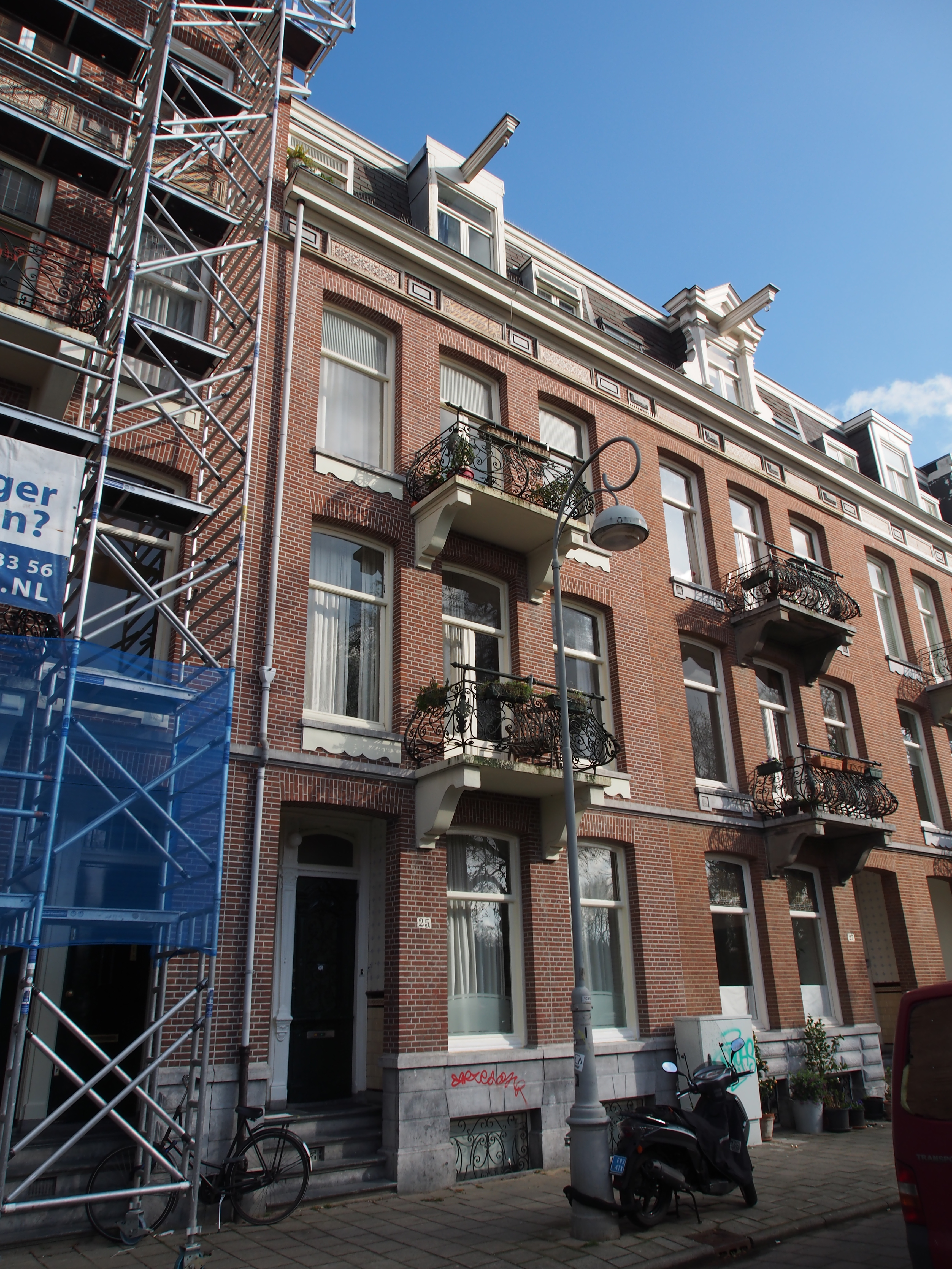 Monument in Amsterdam.